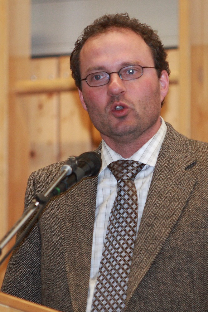 Bürgermeister Severin Graf, Ansprache zum 10 jährigen Jubiläums "Freunde der Aachhöhle e.V."